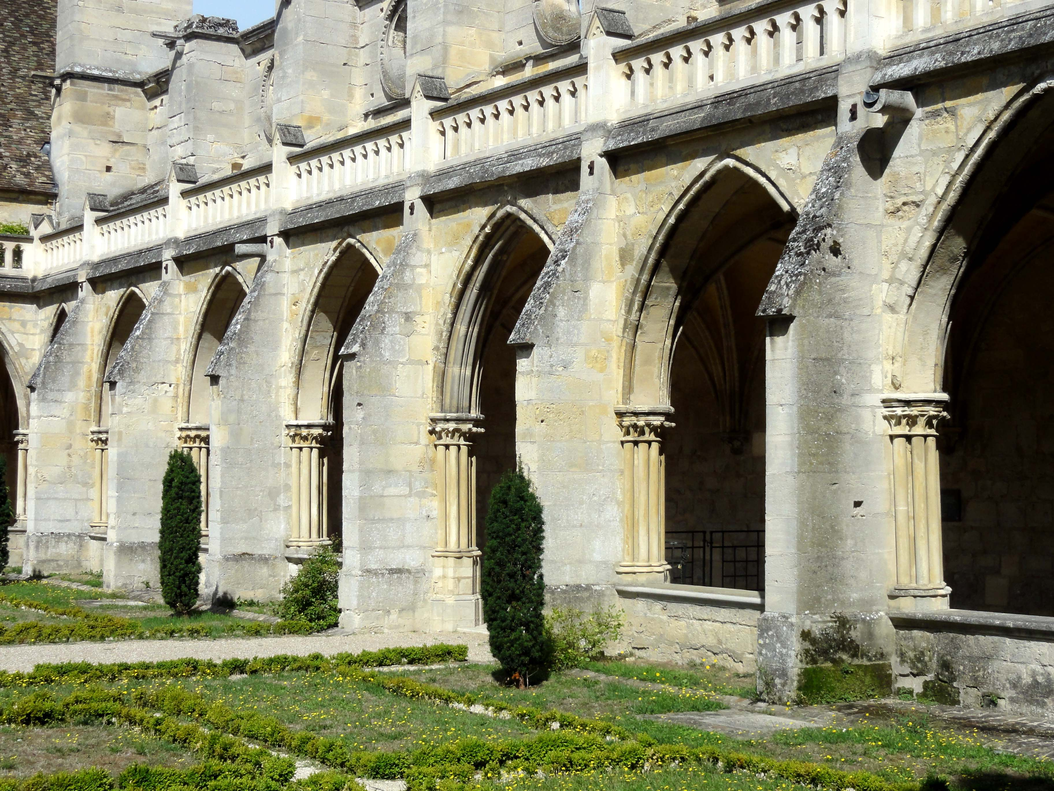 Cloître - voir titre.